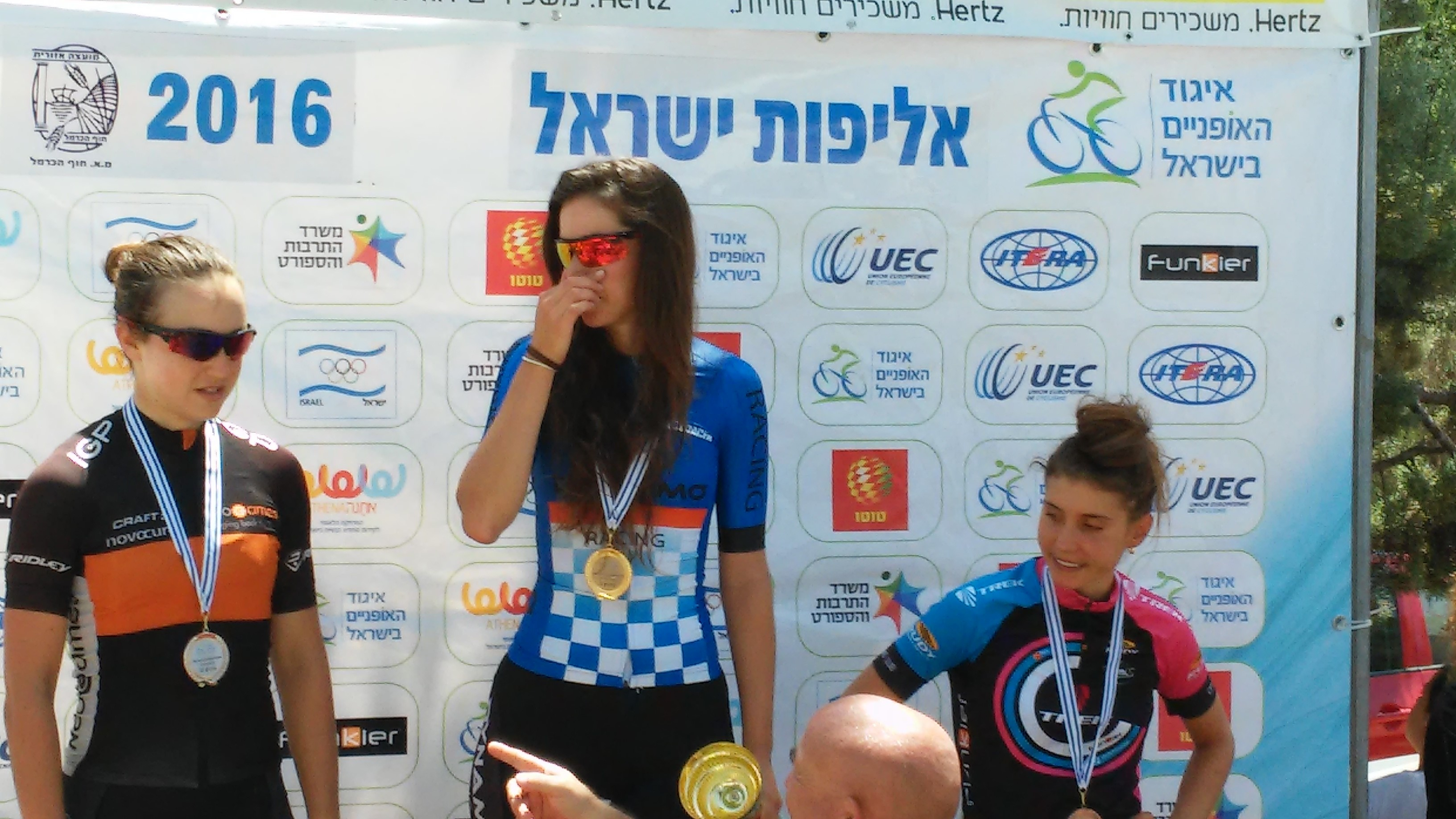 מימין לשמאל: עומר שפירא, מרים בר-און, רותם גפינוביץ